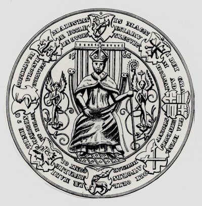 Hertsog Magnuse pitsat Saare-Lääne piiskopina.